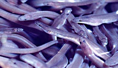 Juvenile american eels (Anguilla rostrata).